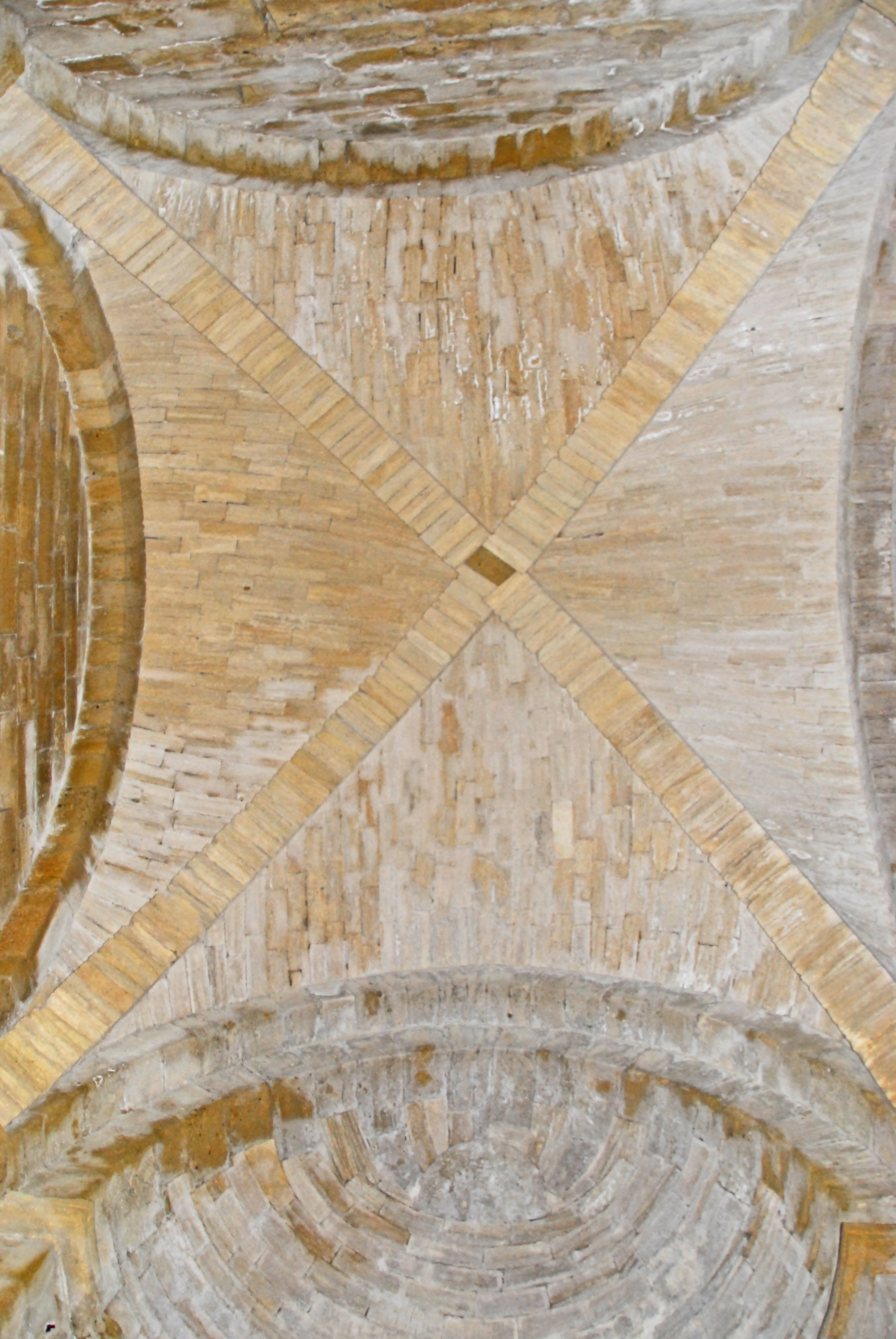 St-Pierre-et-St-Paul de Maguelone, Gewölbe Querschiffarm